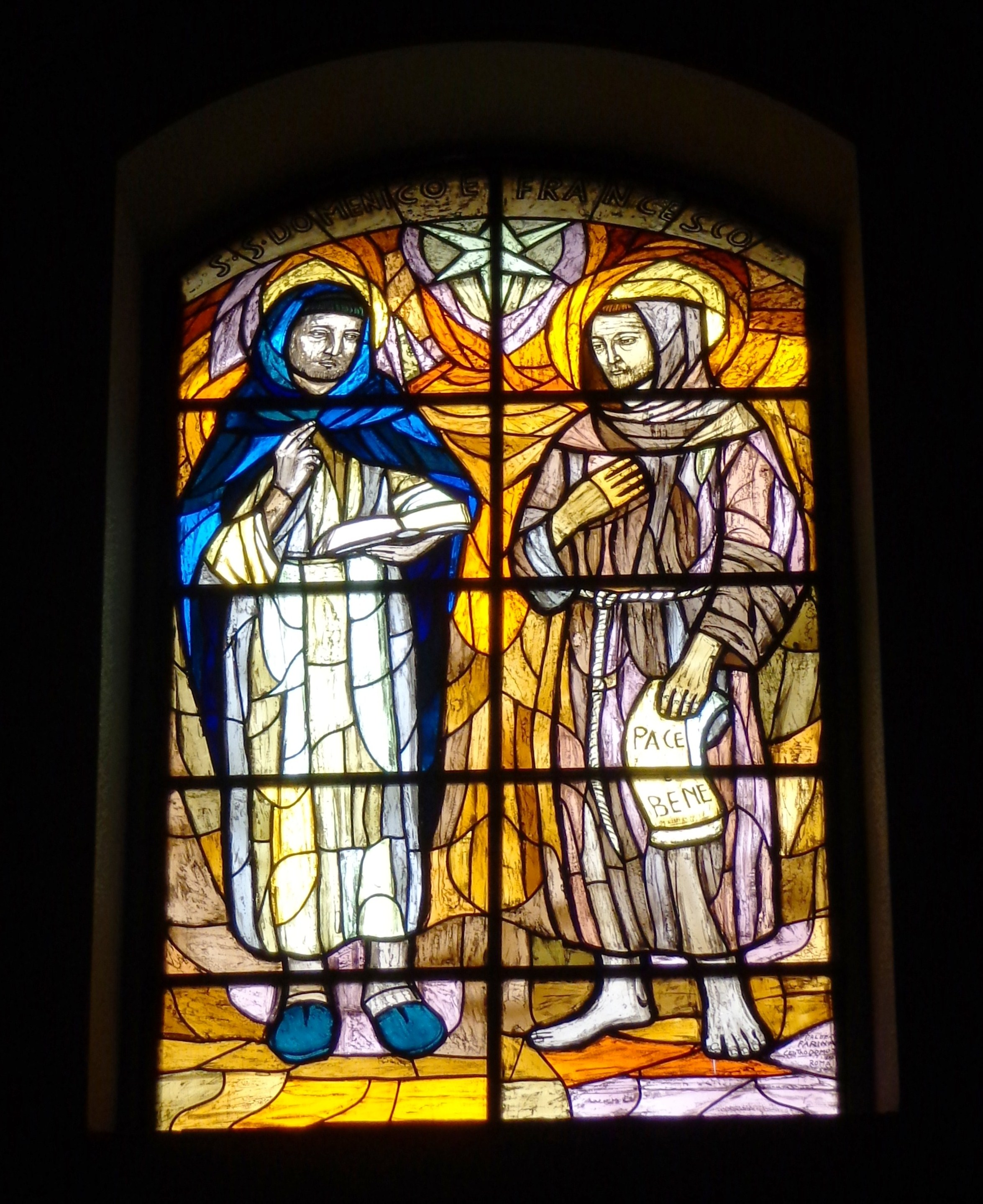 Vetrata Basilica di San Sebastiano Barcellona Pozzo di Gotto; iscrizione (bordo superiore) "S.S. Domenico e Francesco"